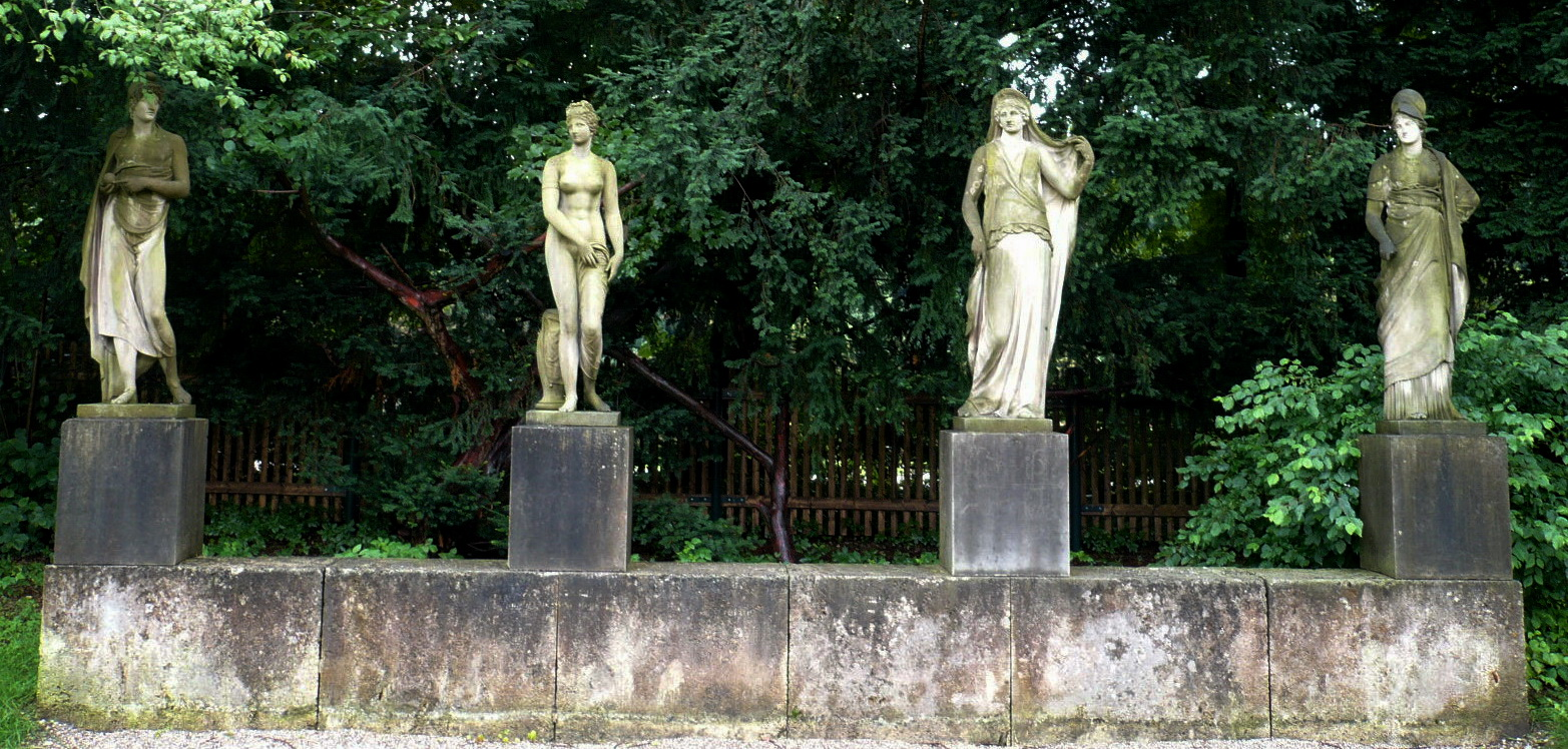 München, Park des Schlosses Nymphenburg, Figurengruppe mit Paris, Venus (Aphrodite), Juno (Hera) und Minerva (Athene)